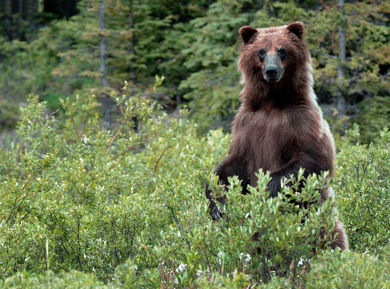 Am Lava Creek überascht uns ein Grizzly beim Kochen, und ist sichtlich selbst überascht.